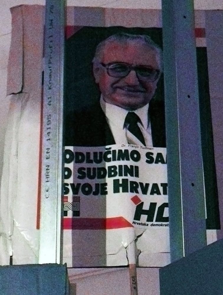 Izložba Domovinski rat u Hrvatskom povjesnom muzeju tijekom Noći muzeja.